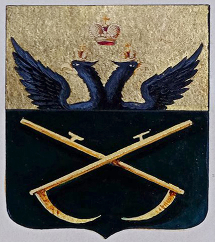 Беларуская (тарашкевіца): Сенна (Sienna). Герб места